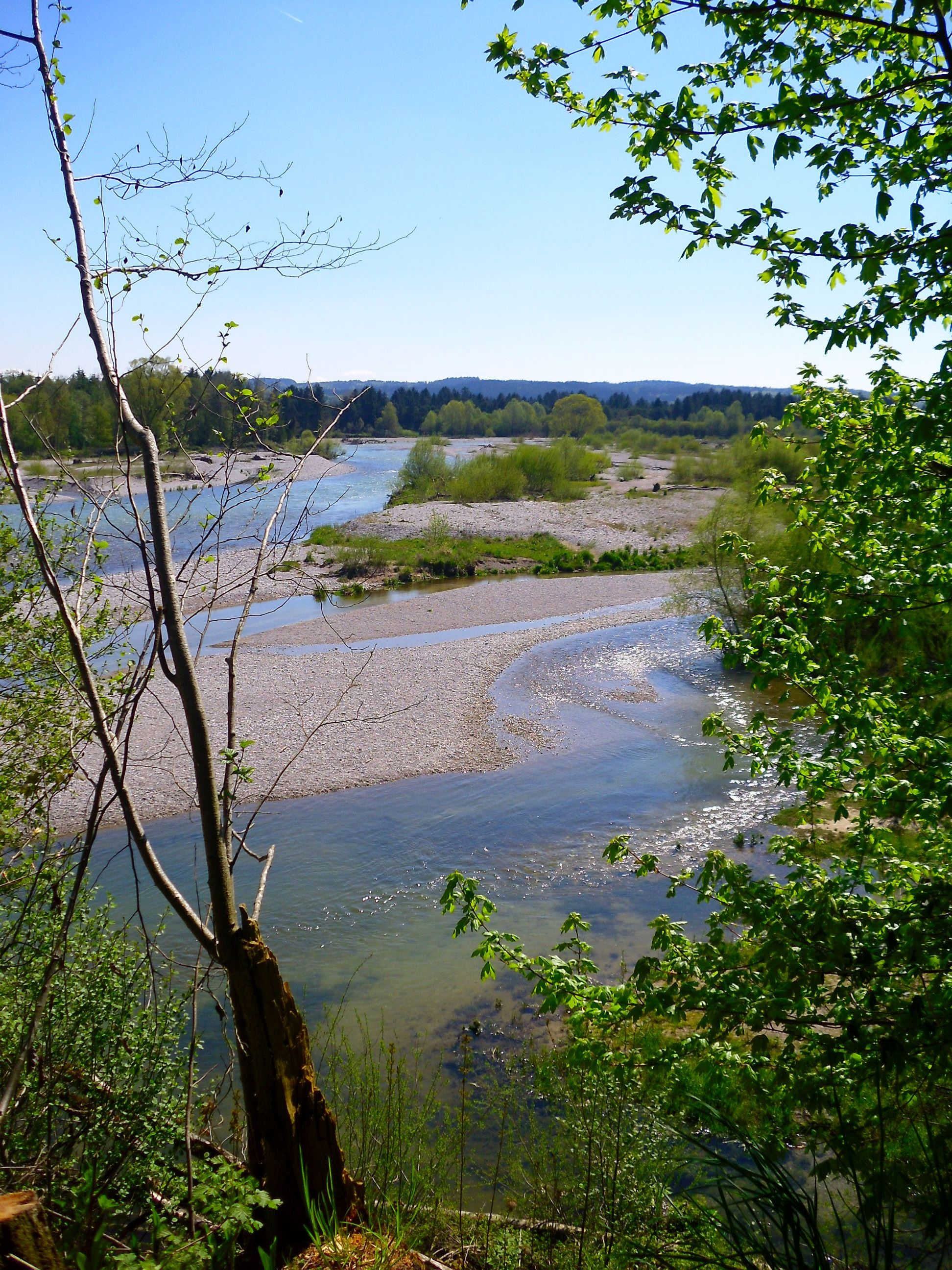 Isar-Wilflusslandschaft bei Geretsried